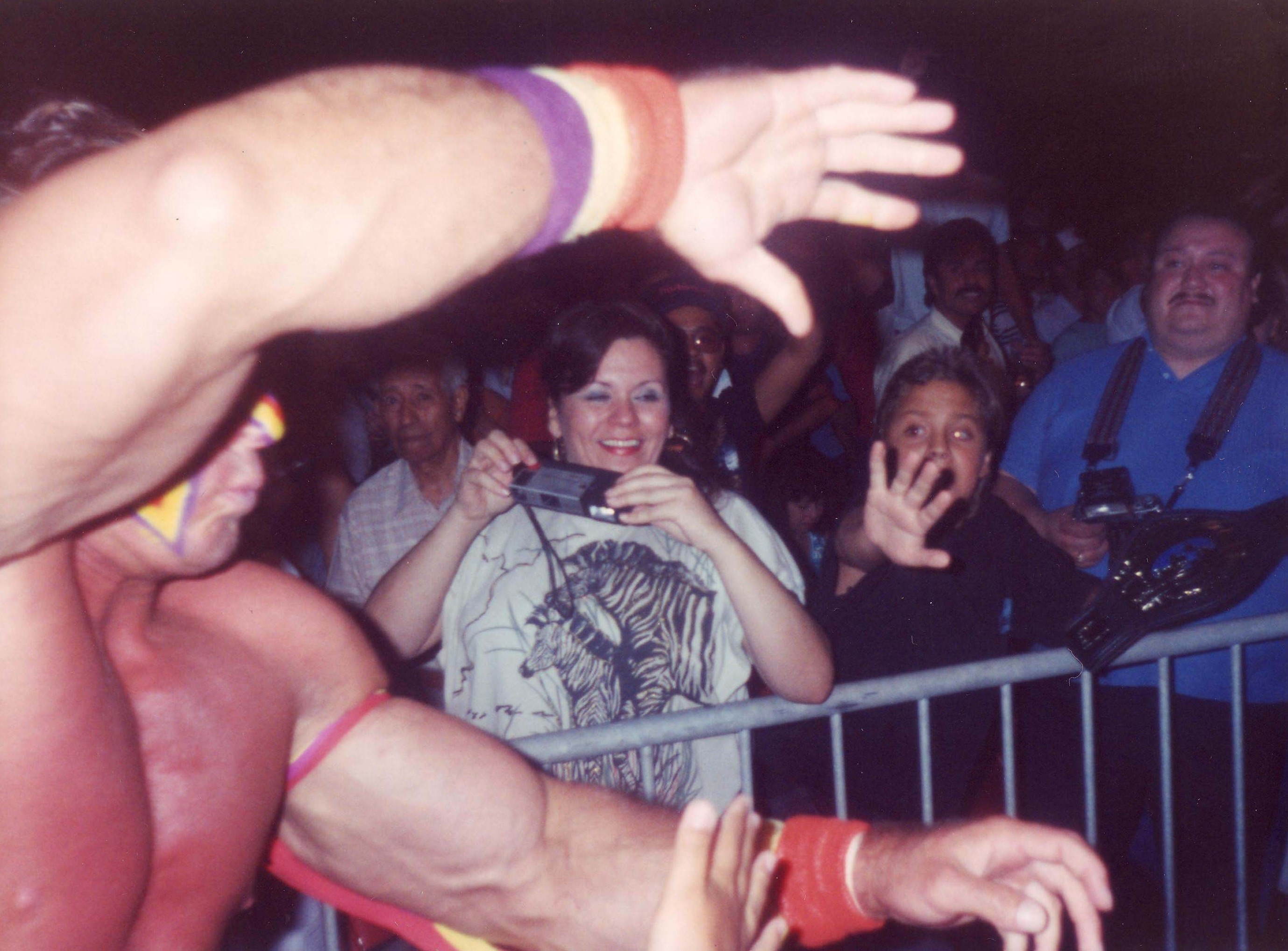 Ultimate Warrior's signature entrance